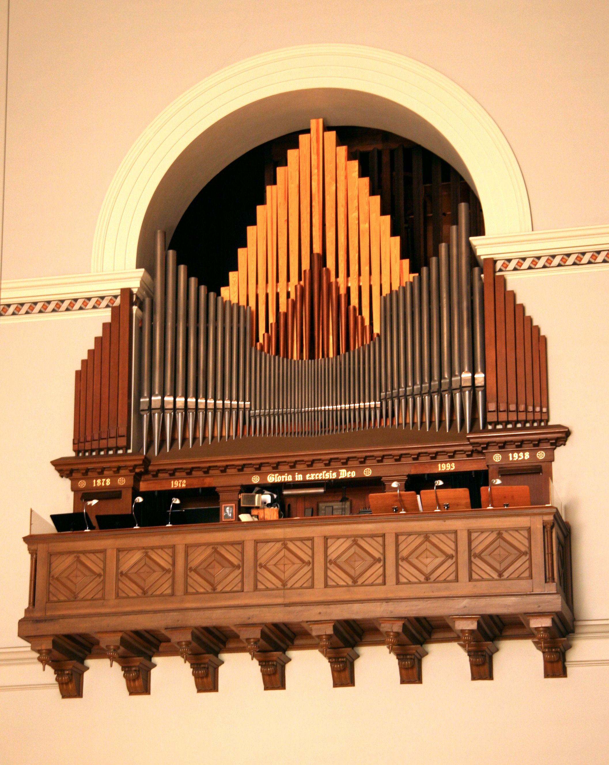 Sankt Pauls Kirke, Copenhagen, Denmark. Organ